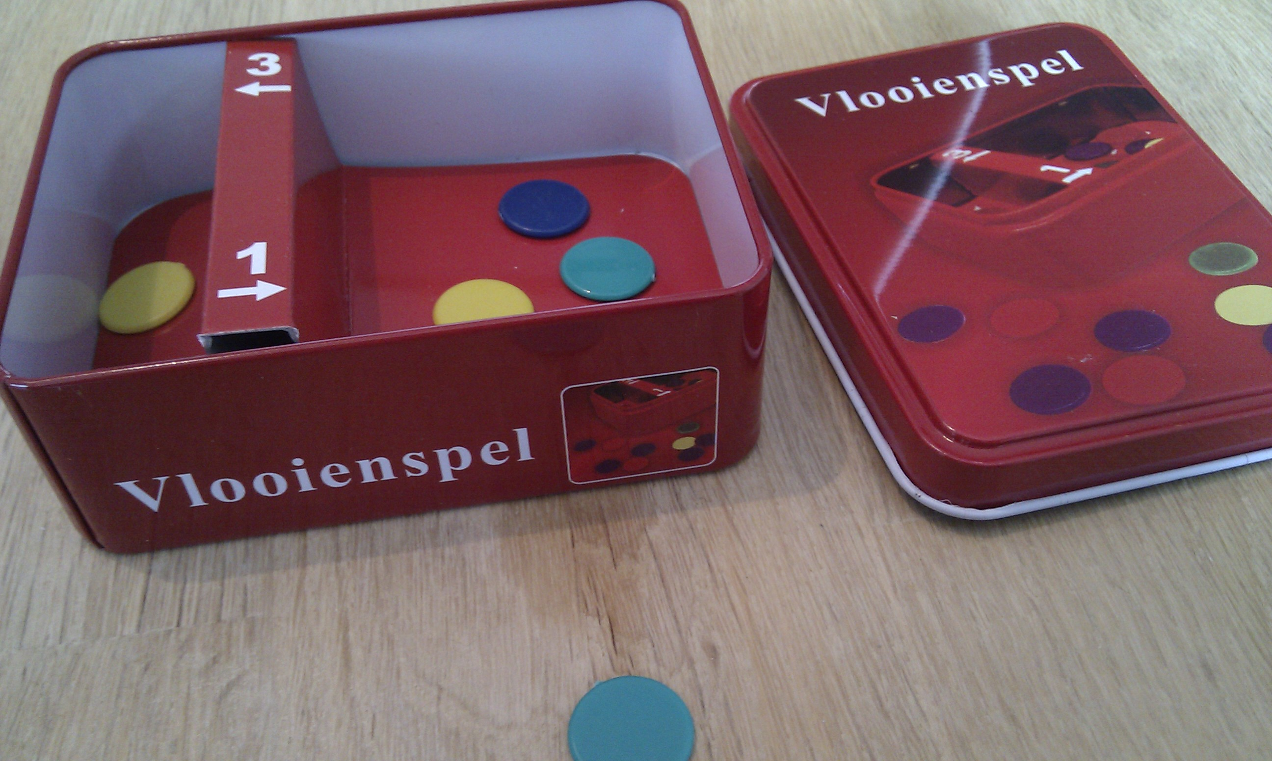 vlooienspel